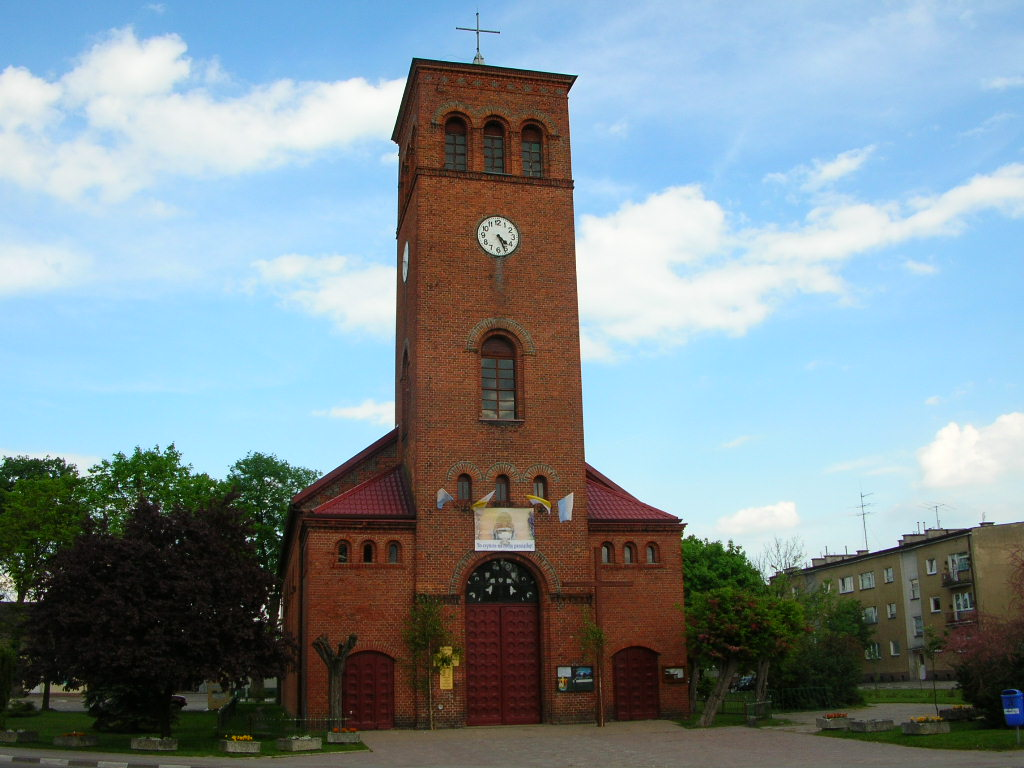 Krajenka - Kościół w centrum miasta Autor - Bartek Wawraszko